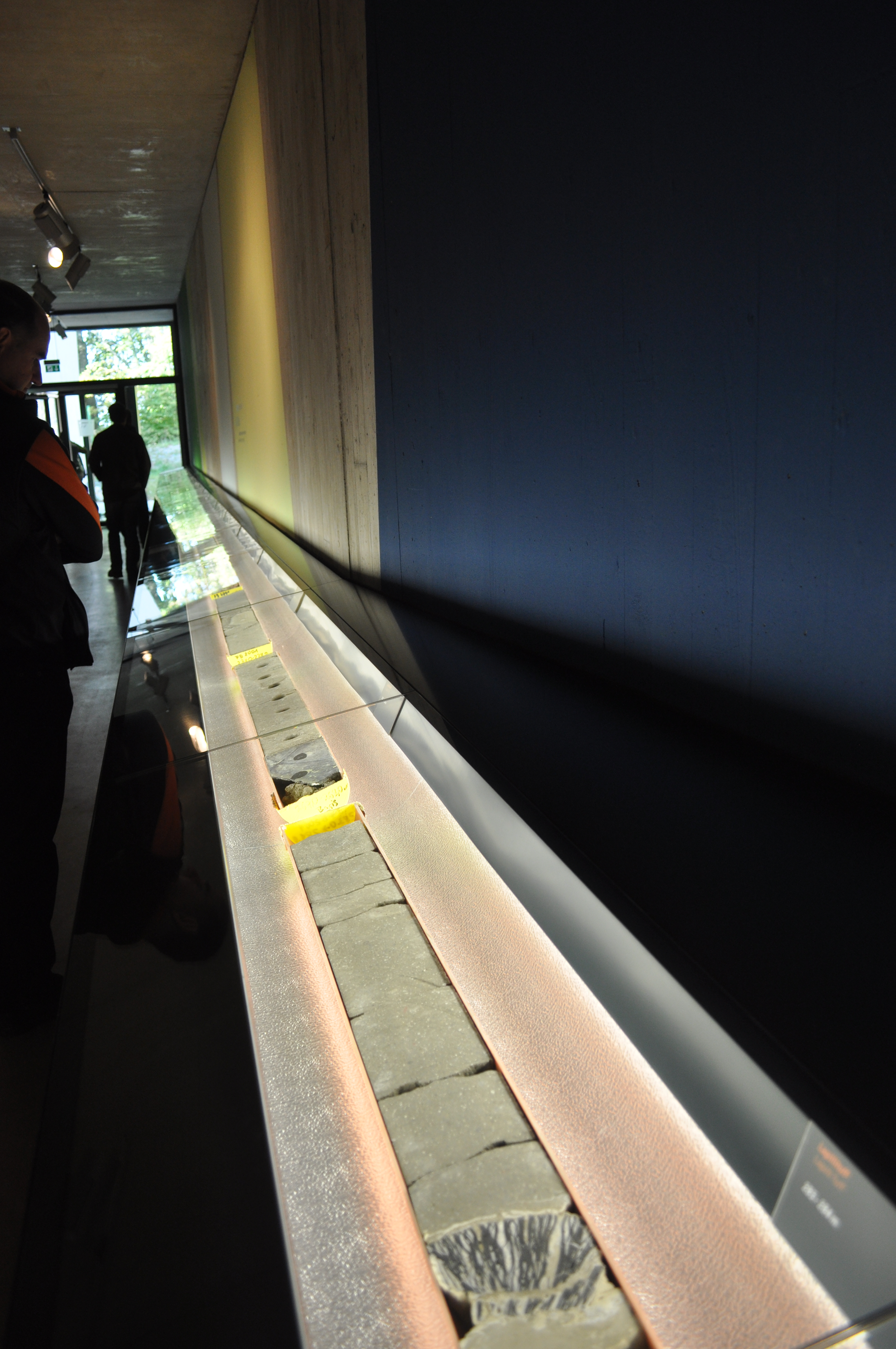 Exposición de los tipos de roca encontrados en las perforaciones del yacimiento fosilífero de Messel. Muestra en la Casa del visitante.